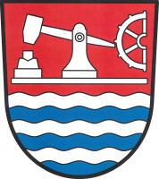 Znak obce Hamr